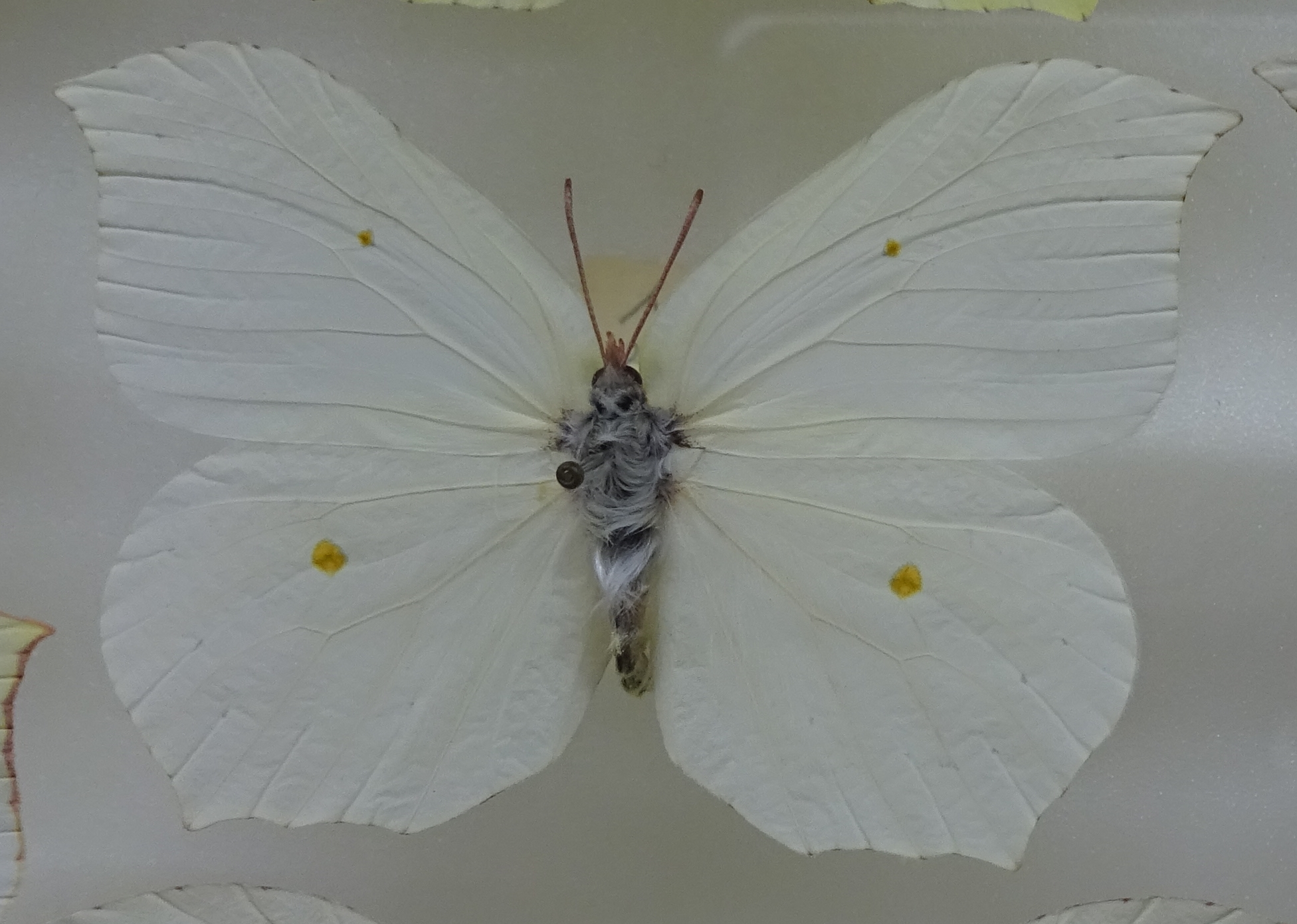 スジボソヤマキチョウ